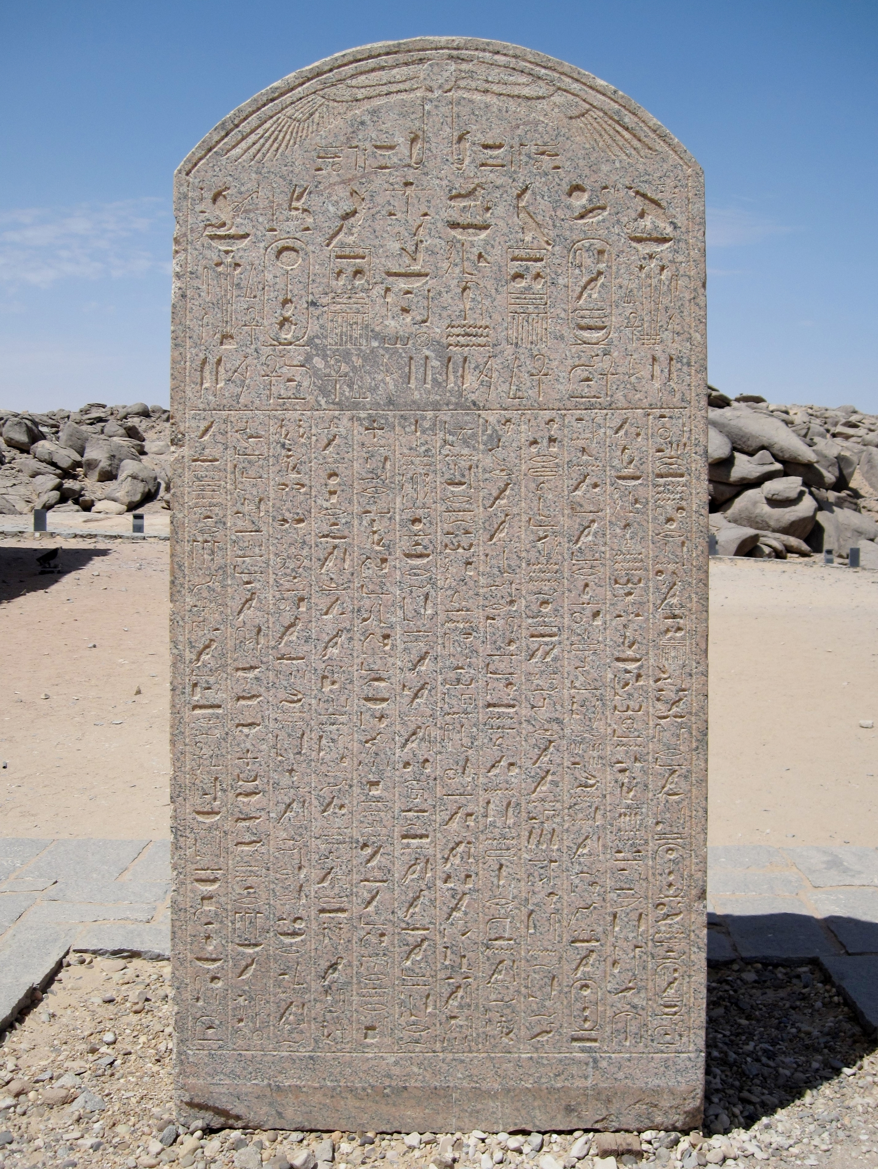 Stele des Psammetich II. vor der Nordseite des Mandulis-Tempels auf der Insel Neu-Kalabscha im Nassersee, Ägypten